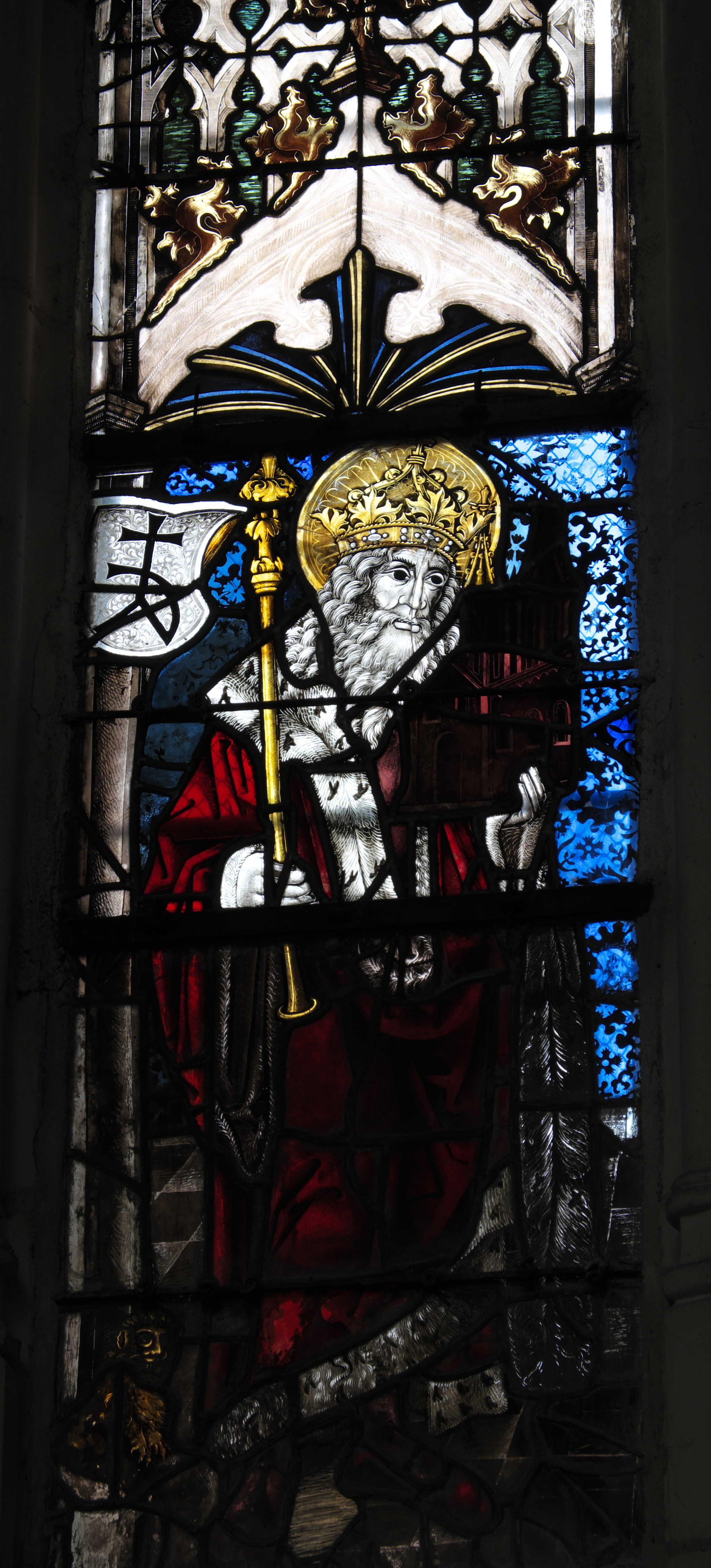 Bleiglasfenster (Baie 9) in der Basilika Saint-Nicolas in Saint-Nicolas-de-Port im Département Meurthe-et-Moselle (Lothringen/Frankreich), aus der Zeit um 1508—1510, einer Nürnberger Werkstatt zugeschrieben; Darstellung (Ausschnitt): Kaiser Heinrich II.